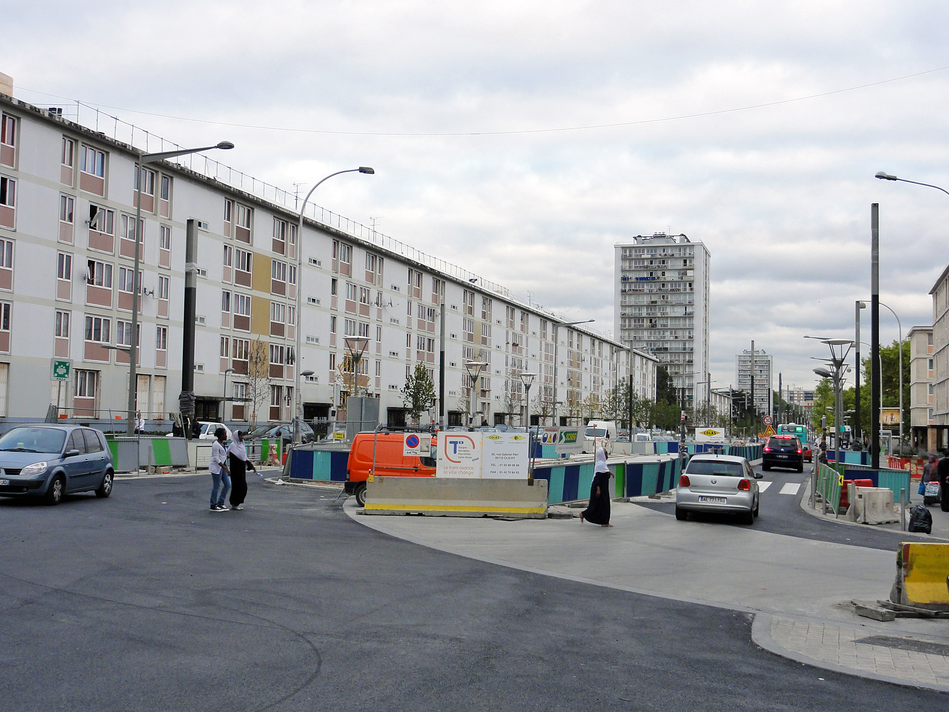 Travaux du T5, avenue Paul-Valéry à Sarcelles, France.